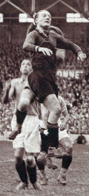 Le Belge Bernard Voorhoof (sombre) sautant plus haut que tout le monde, lors du 8e de finale de Coupe du monde 1938, perdu face à la France à Colombes.